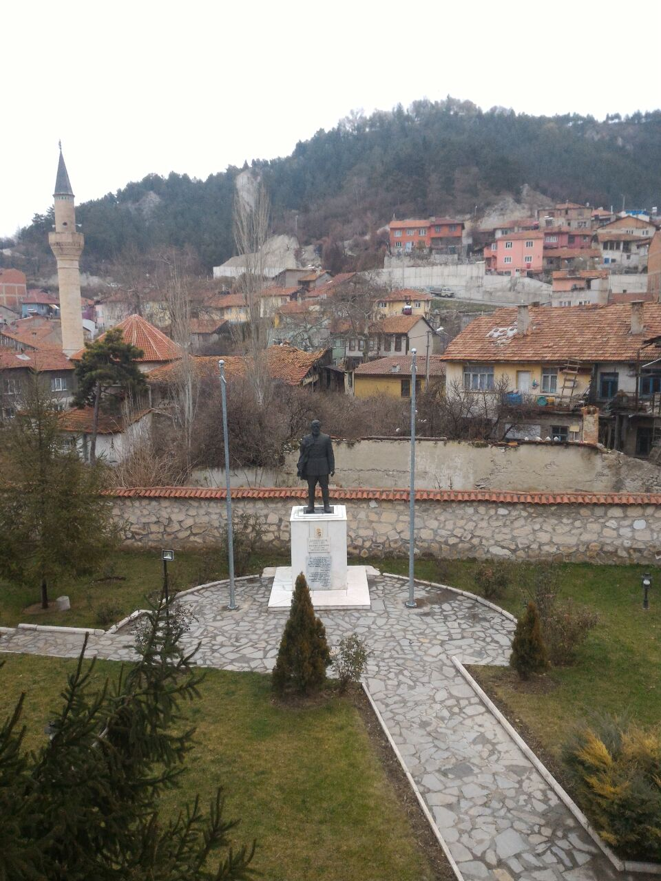 Kossuth Evi Müzesindeki bahçede yer alan Kossuth'un heykeli.